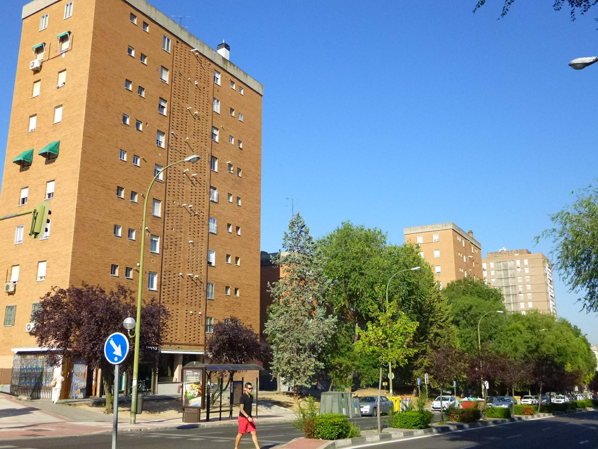 Distrito de Moratalaz (Madrid)